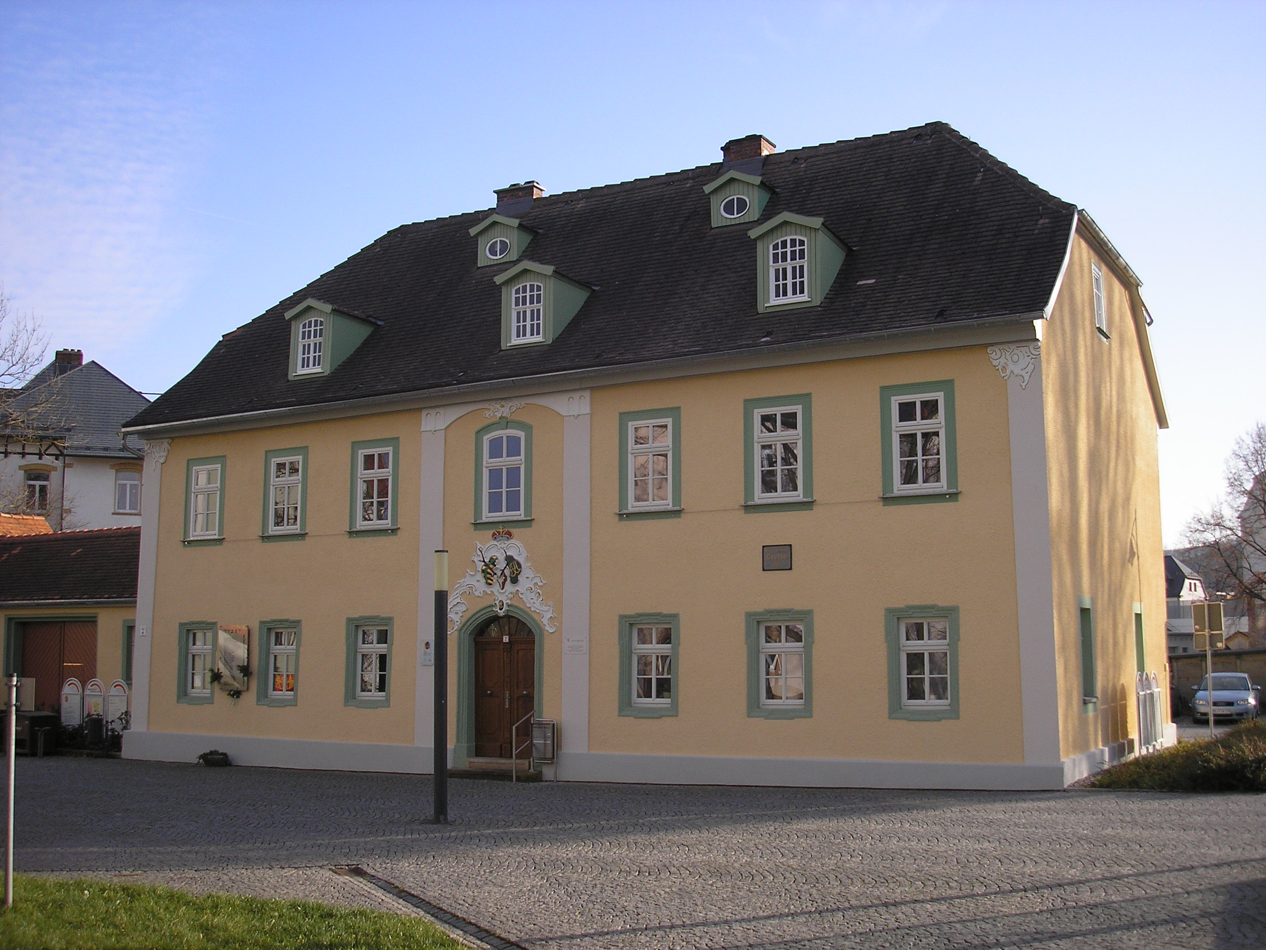 Die Alte Försterei in Ilmenau (Thüringen) nach der Sanierung.